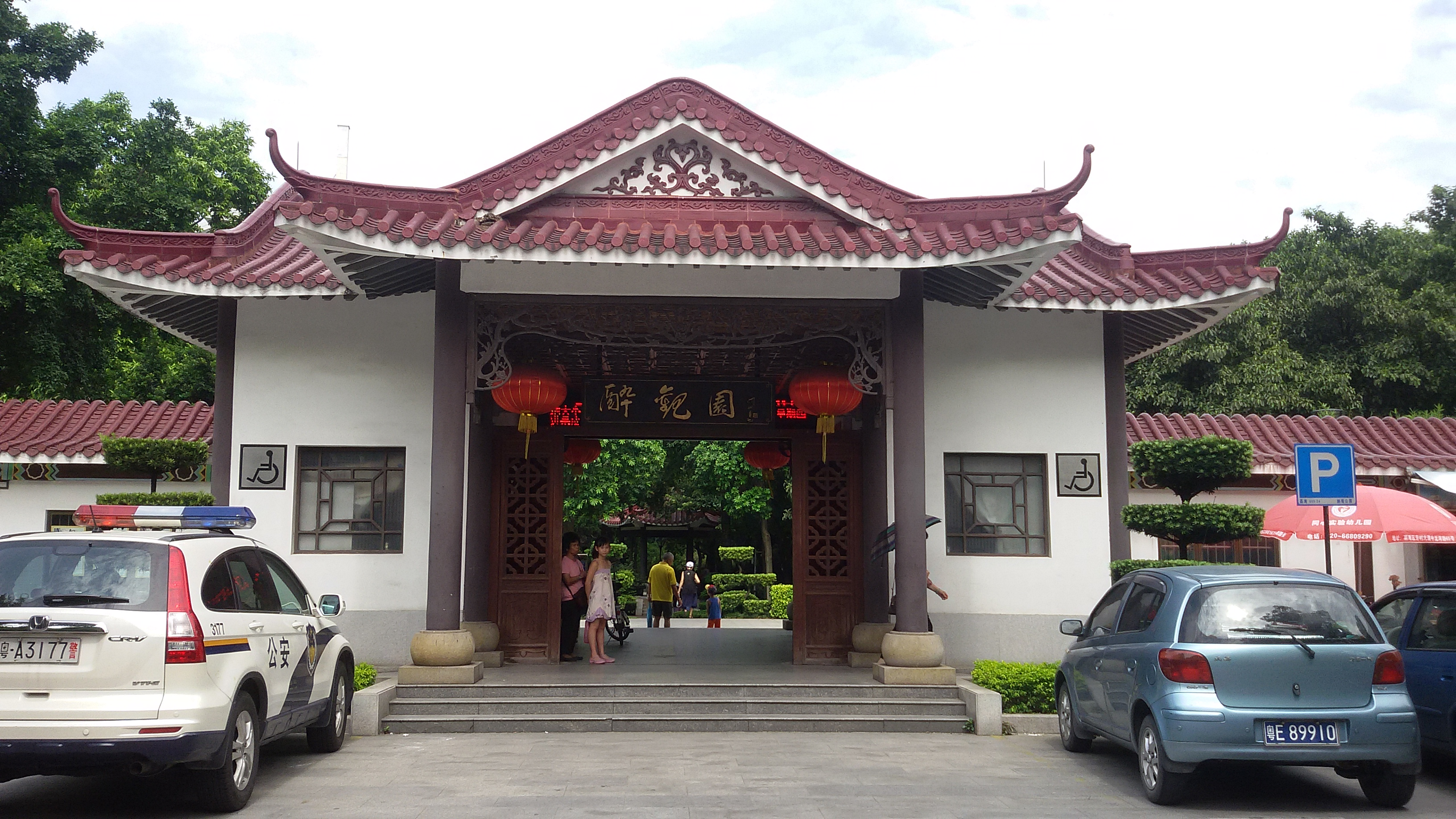 粵語: 醉觀公園嘅正門